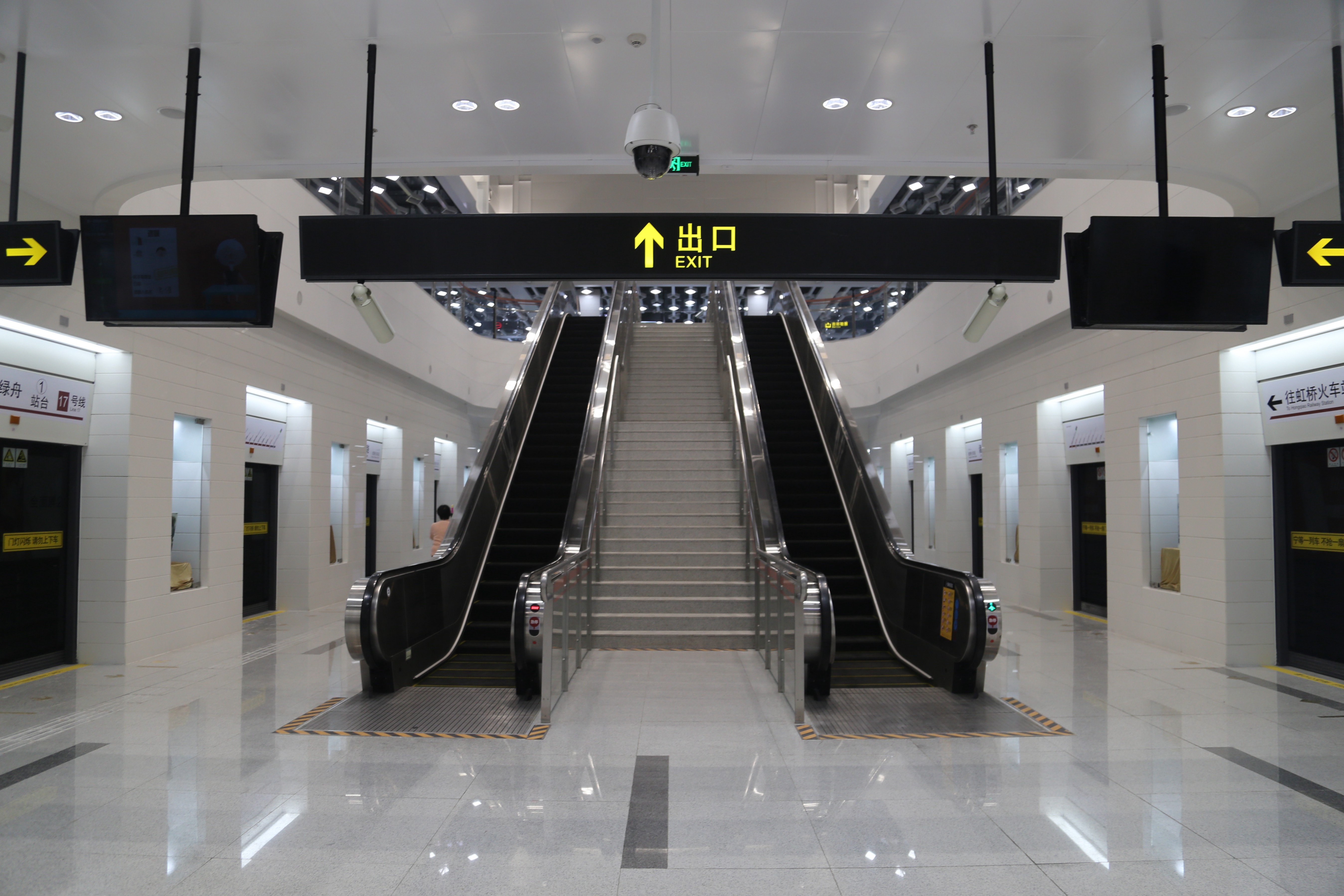 诸光路站站台